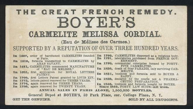 Eau des Carmes Boyers, face B